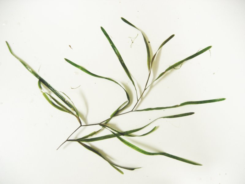 Flachstängeliges Laichkraut Potamogeton compressus, Müritz-Gebiet